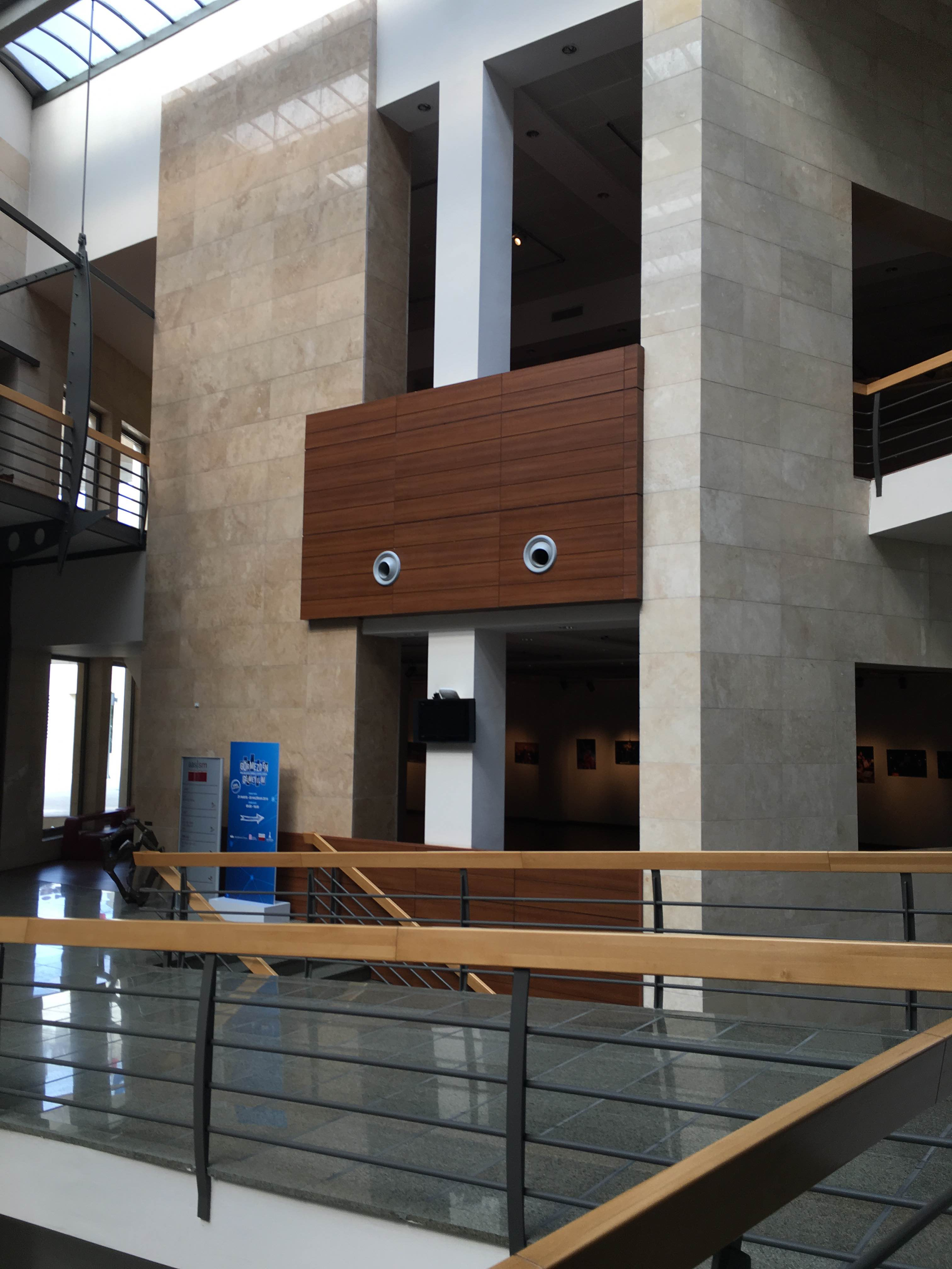 Different materials that are used can be seen together.